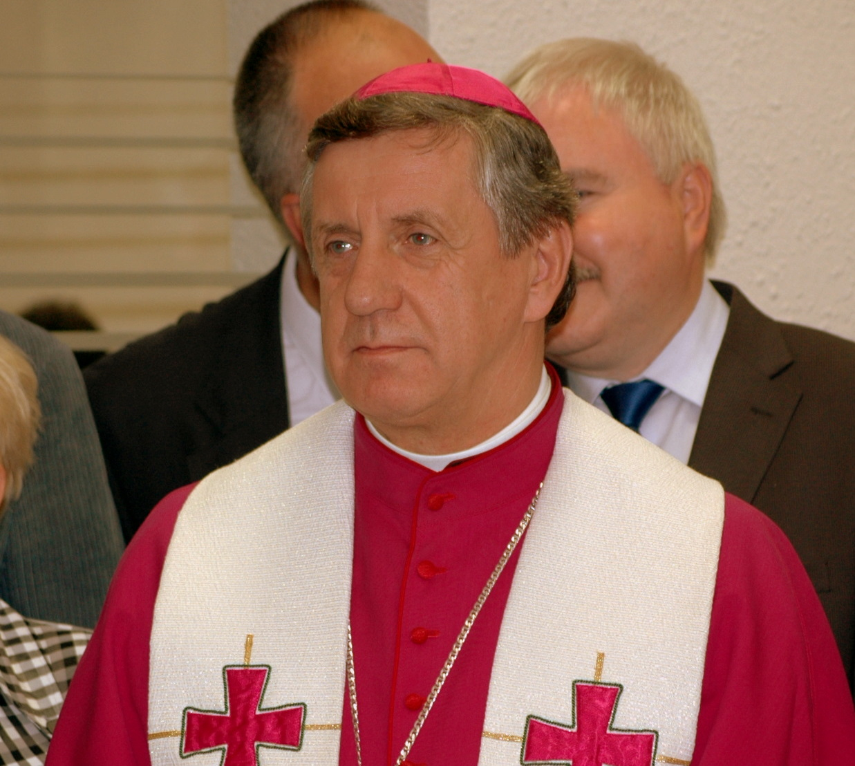 Andrzej Dzięga - polski duchowny katolicki, arcybiskup metropolita szczecińsko-kamieński.